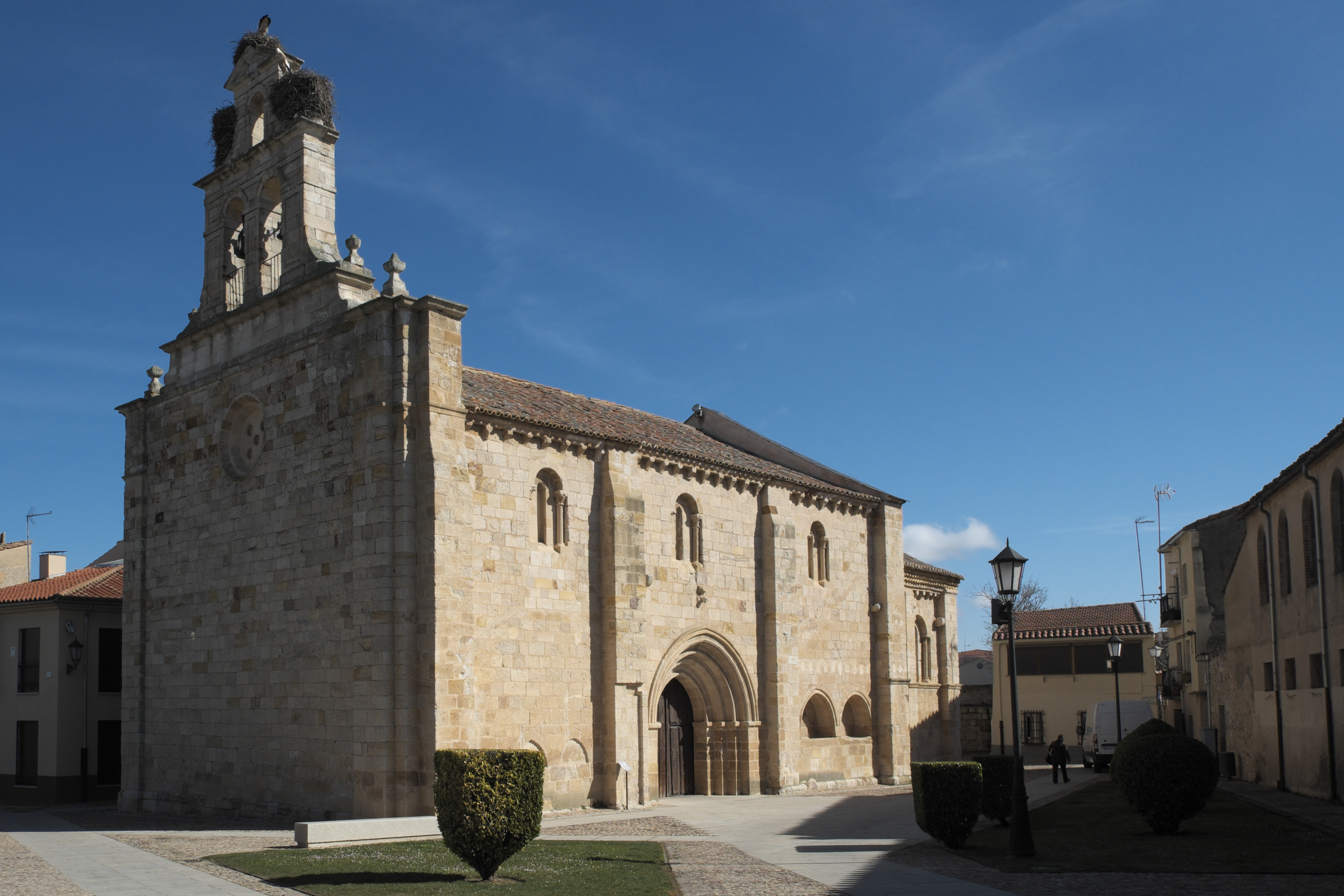 Kirche San Isidoro in Zamora (Kastilien-León/Spanien), Ansicht von Südwesten